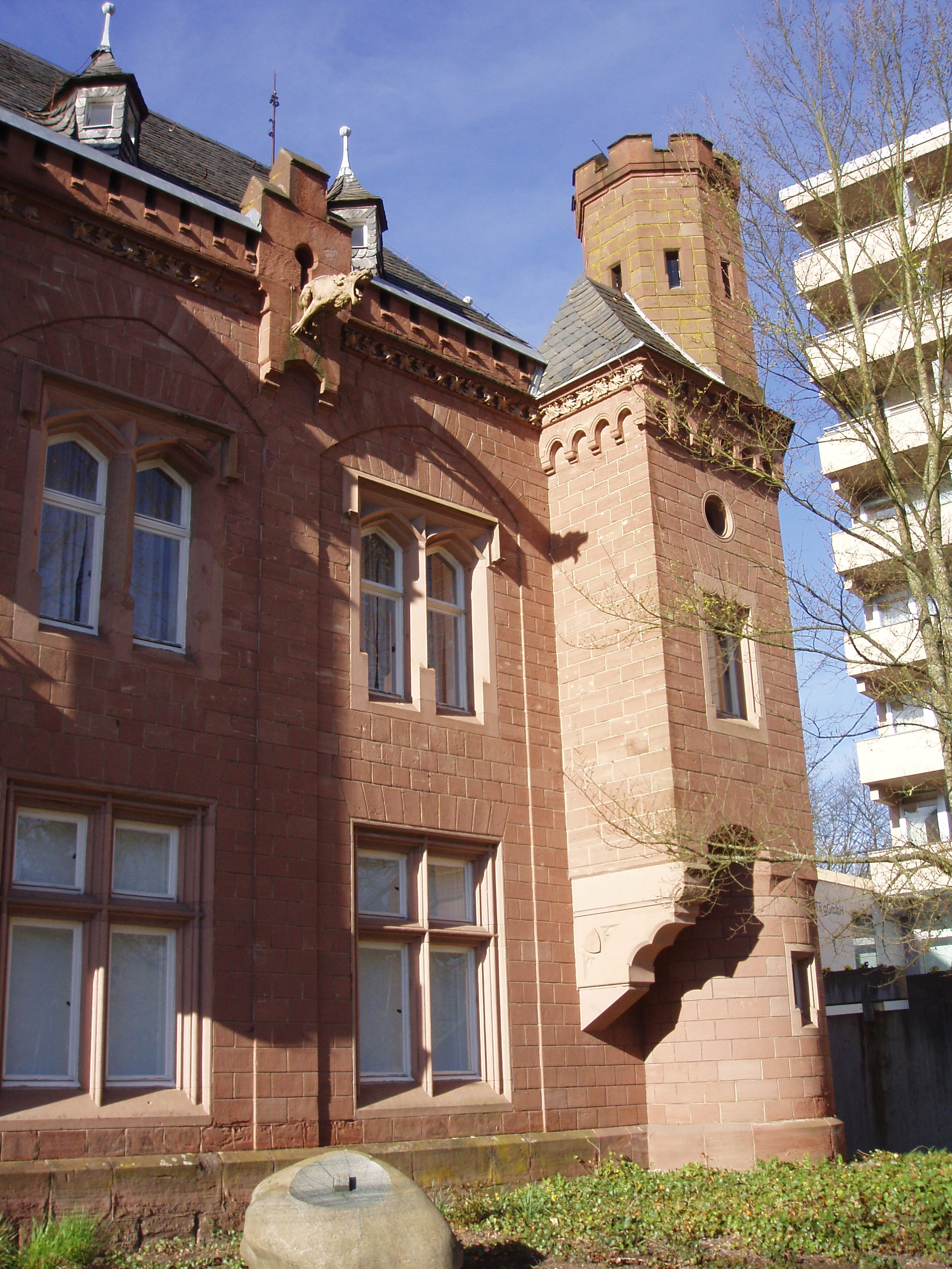 Detail am Schloss Fellenberg